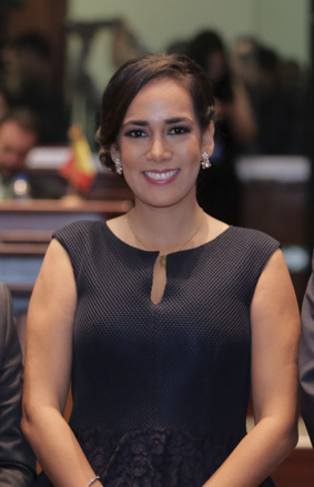 Viviana Bonilla durante la Primera Sesión Parlamentaria de Posesión de las y los Asambleístas para el Período Legislativo 2017-2021